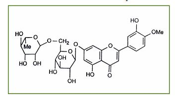 A diozmin (képlet) a vele rokon heszperidintől a molekula C-gyűrűjében a 2-3. szénatom közötti kettős kötés meglétében különbözik. Kémiai szintézise a heszperidin átalakítása révén történik.